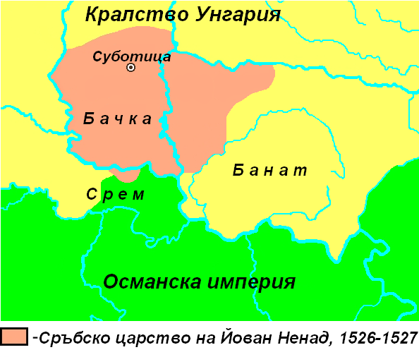 Карта на сръбската държава на Йован Ненад